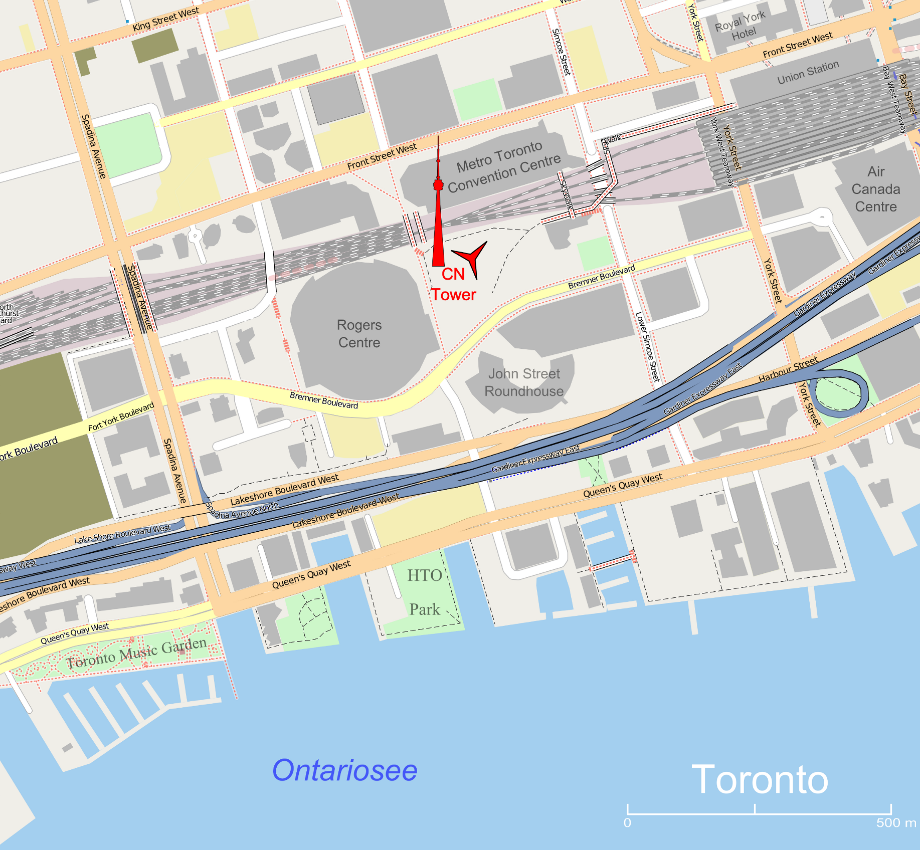 Lagekarte des CN Tower in Downtown Toronto This map may be incomplete, and may contain errors. Don't rely solely on it for navigation.